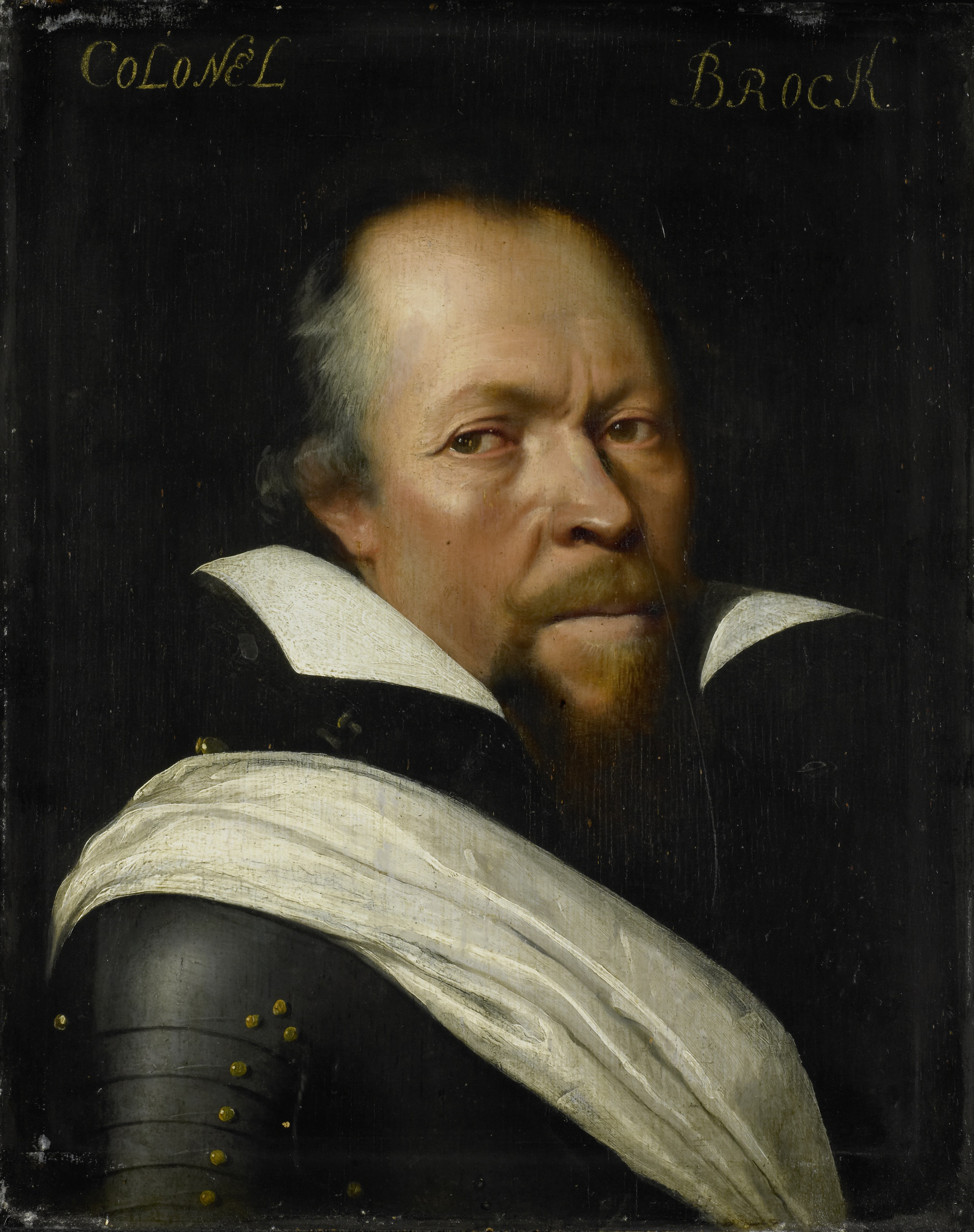 Portret van Sir William Brog (gest. 1636). Vanaf 1588 kolonel bij de Schotse brigades in Staatse dienst. Buste naar rechts, in wapenrusting. Onderdeel van de reeks portretten afkomstig uit het Stadhouderlijk Hof te Leeuwarden. Collection: schilderijen; Leeuwarden serie